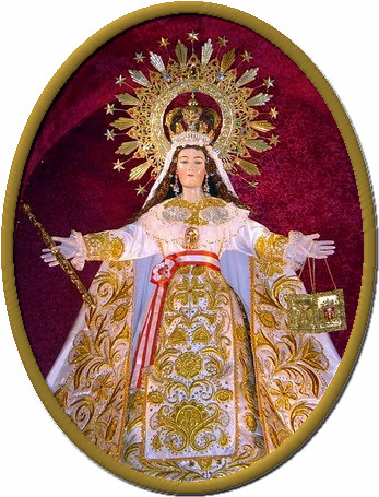 Virgen de la Merced (Cuzco)